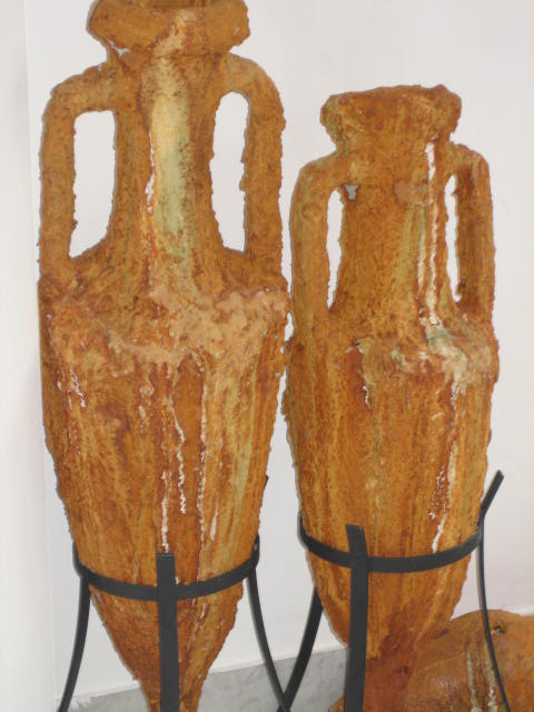 Anforas antiguas para almacenar vino